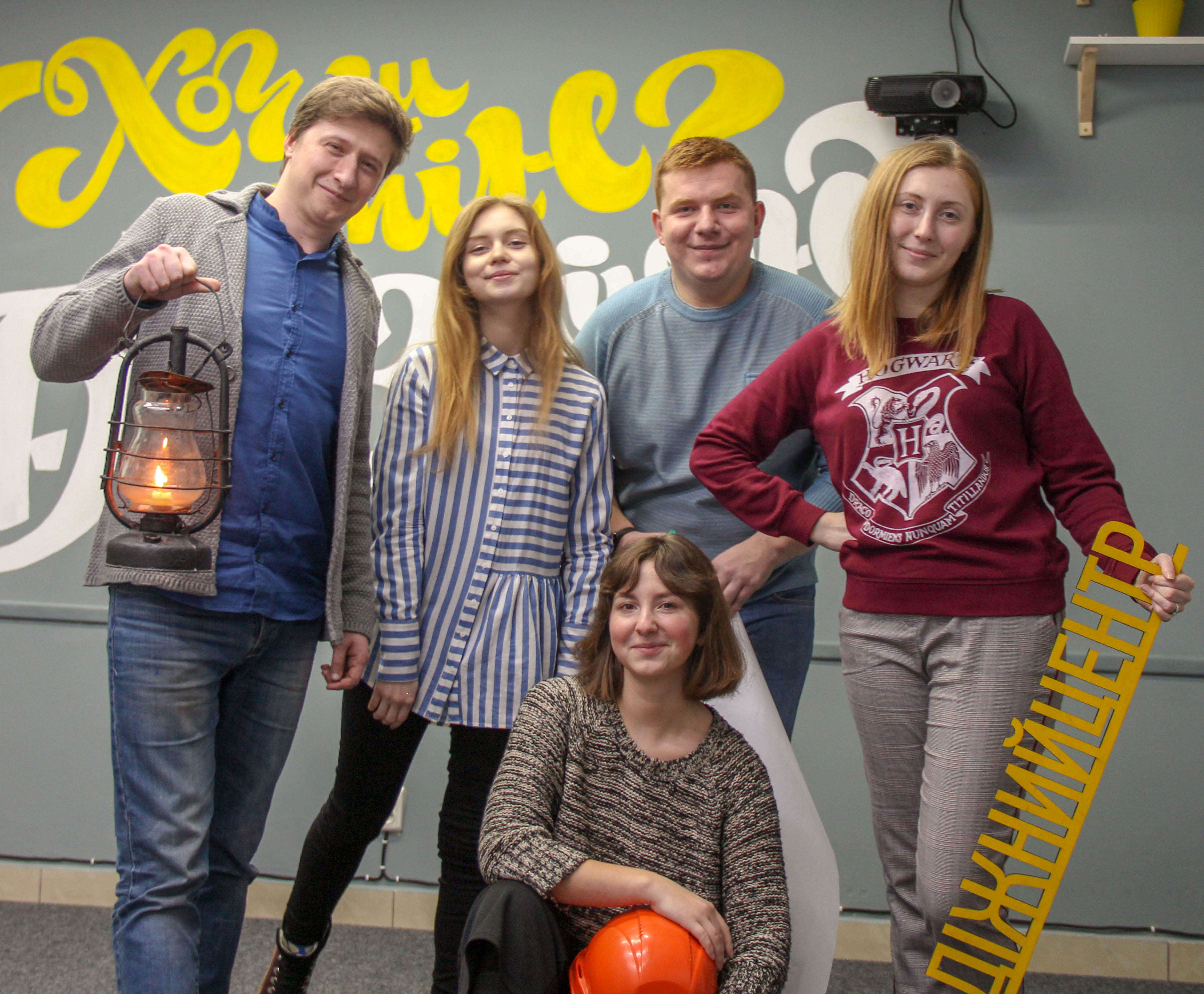 команда мцв